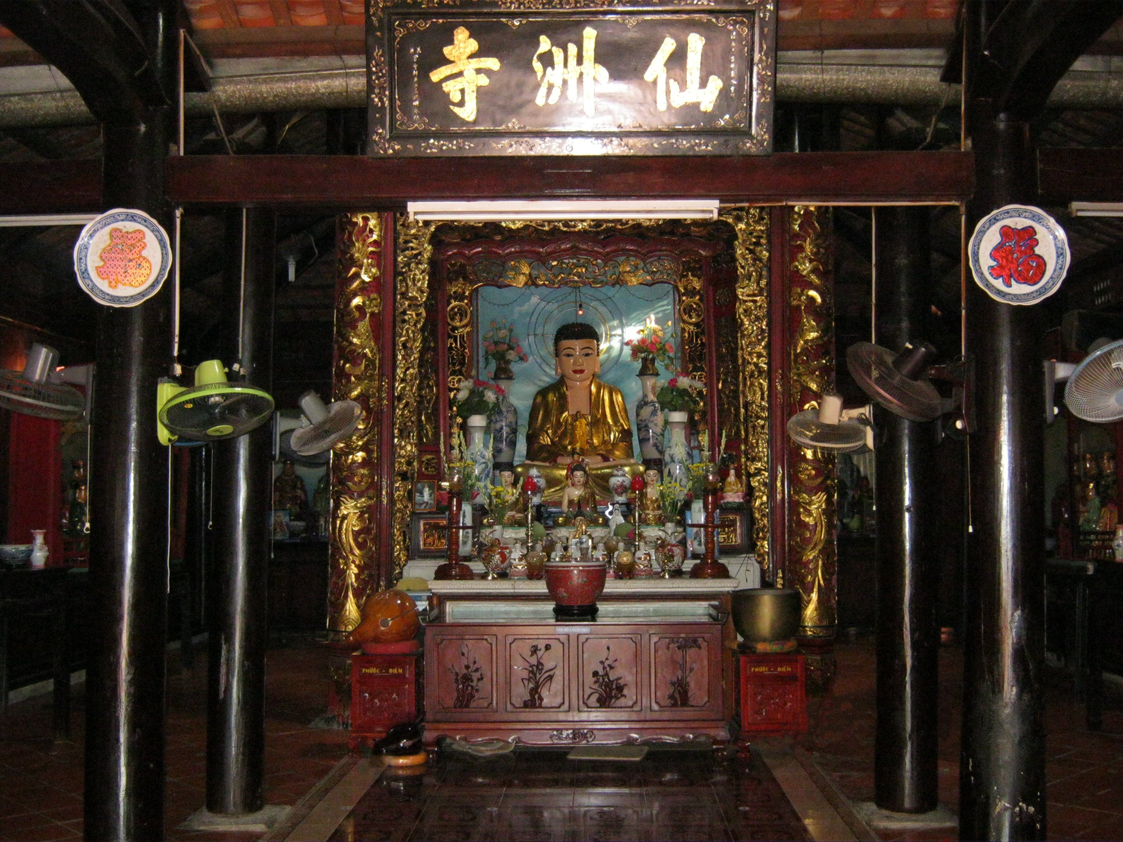 Bên trong chánh điện chùa Tiên Châu, tọa lạc trên cù lao An Bình, thuộc huyện Long Hồ, tỉnh Vĩnh Long (Việt Nam).